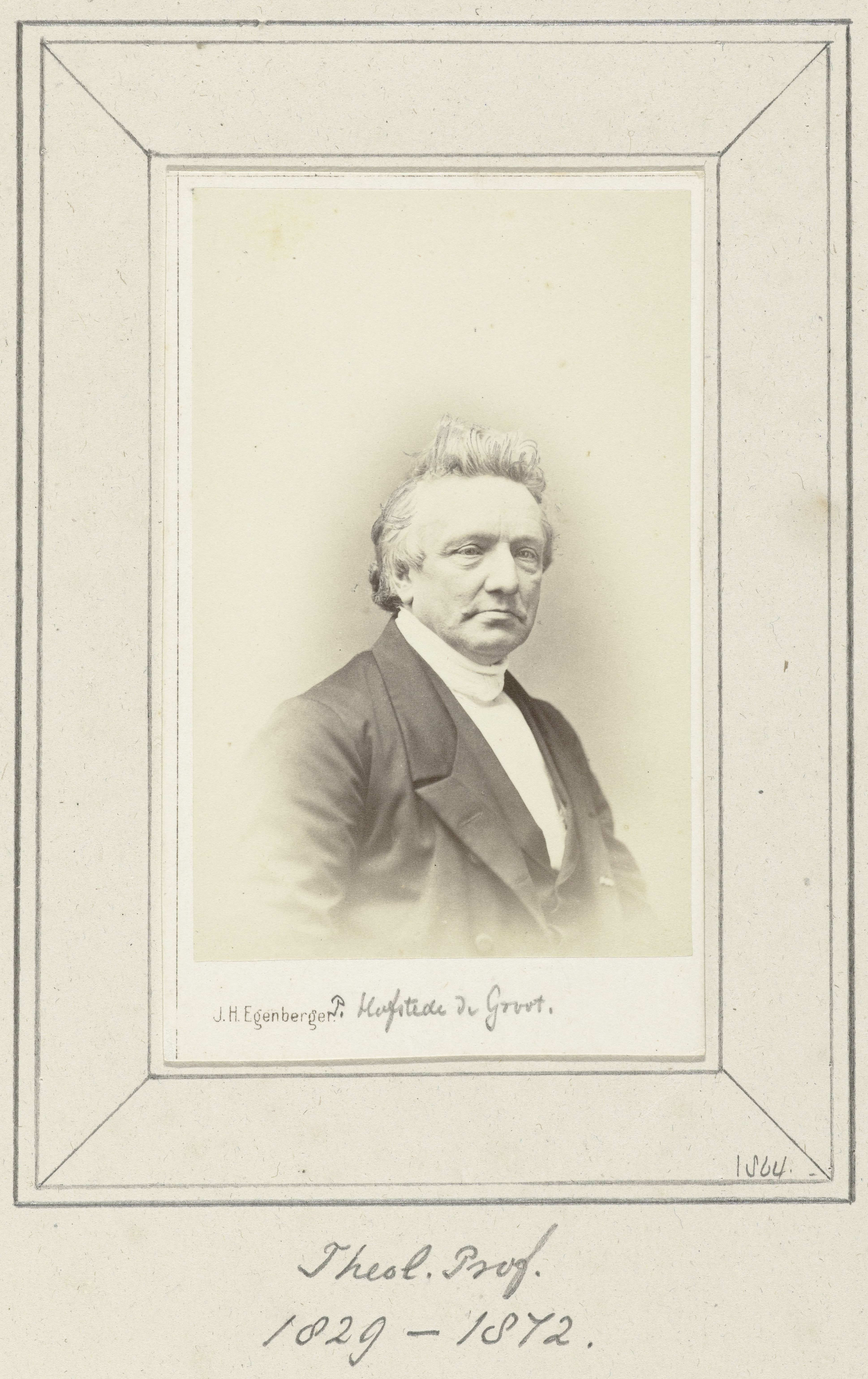 IdentificatieTitel(s): Portret van P. Hofstede de Groot, hoogleraar in de faculteit Godgeleerdheid aan de universiteit van GroningenHofstede de Groot theol. prof 1829-1872 (titel op object)Objecttype: foto carte-de-visite Objectnummer: RP-F-F03671Opschriften / Merken: naam, onder foto, met inkt geschreven: ‘Hofstede de Groot theol. prof 1829-1872’VervaardigingVervaardiger: fotograaf: Johannes Hinderikus Egenberger (vermeld op object)Plaats vervaardiging: UtrechtDatering: 1860 - 1864Fysieke kenmerken: albuminedrukMateriaal: papier Techniek: albuminedrukAfmetingen: foto: h 102 mm × b 57 mmblad: h 532 mm × b 352 mmVerwerving en rechtenVerwerving: overdracht van beheer 1994Copyright: Publiek domein